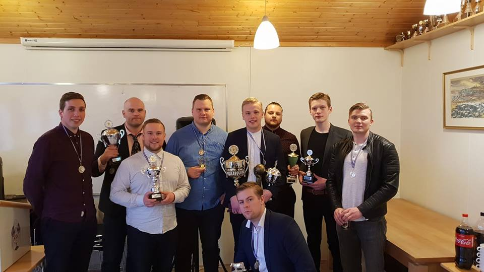 Verðlaunahafar á lokahófi 2018